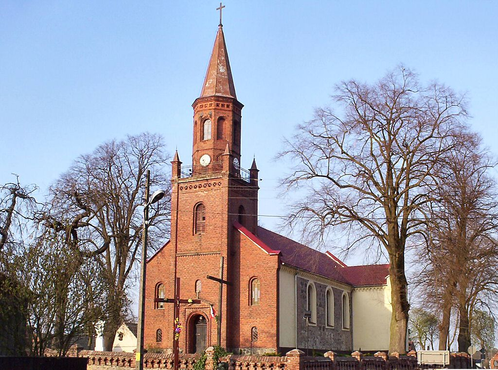 Warnice - rzymskokatolicki kosciół parafialny p.w. św. Józefa Oblubieńca Najświętszej Maryi Panny, 1 poł. XIV, 1858